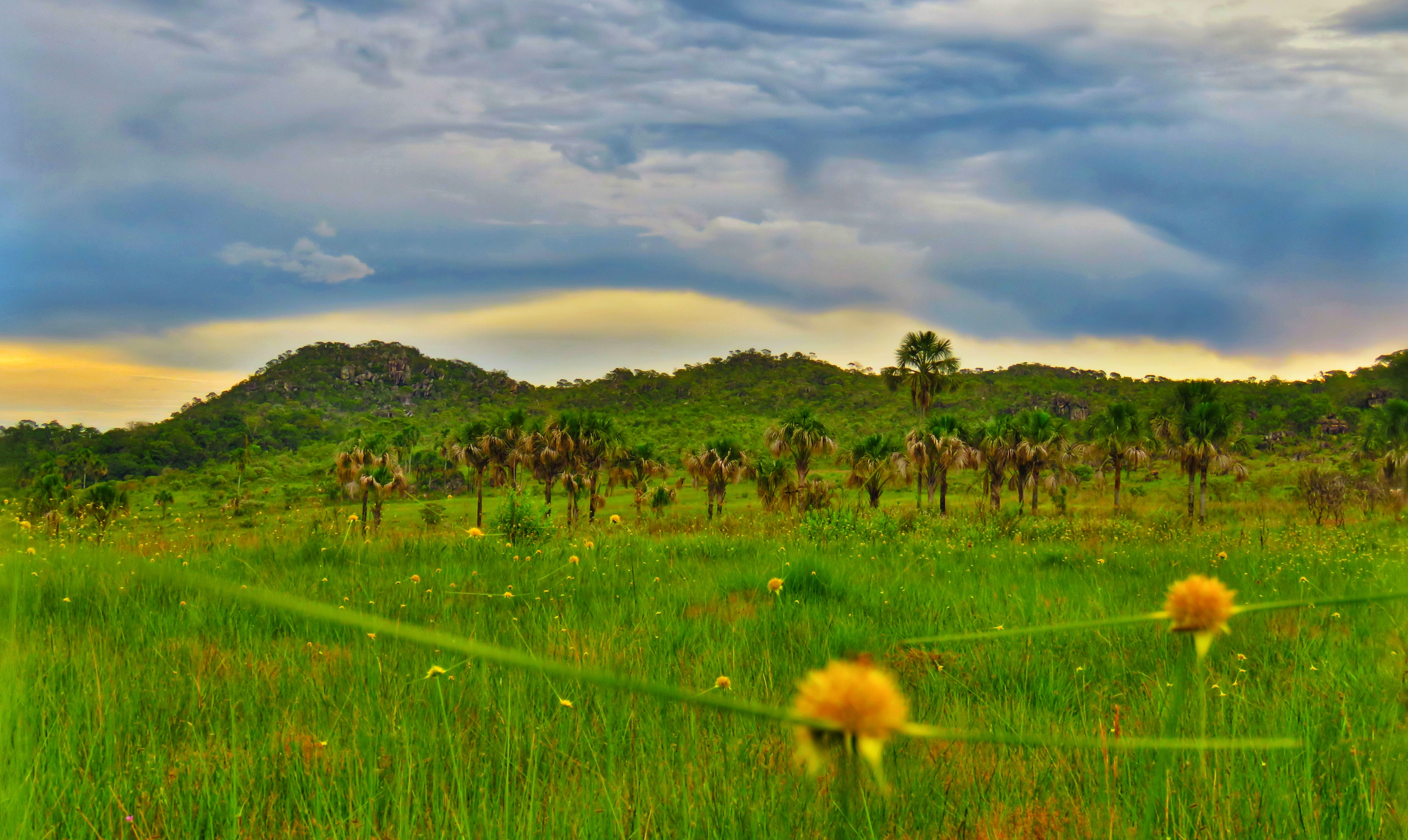 Veredas no Parque Estadual do Pireneus. Em época de chuva o local ganha muita cor e vida.